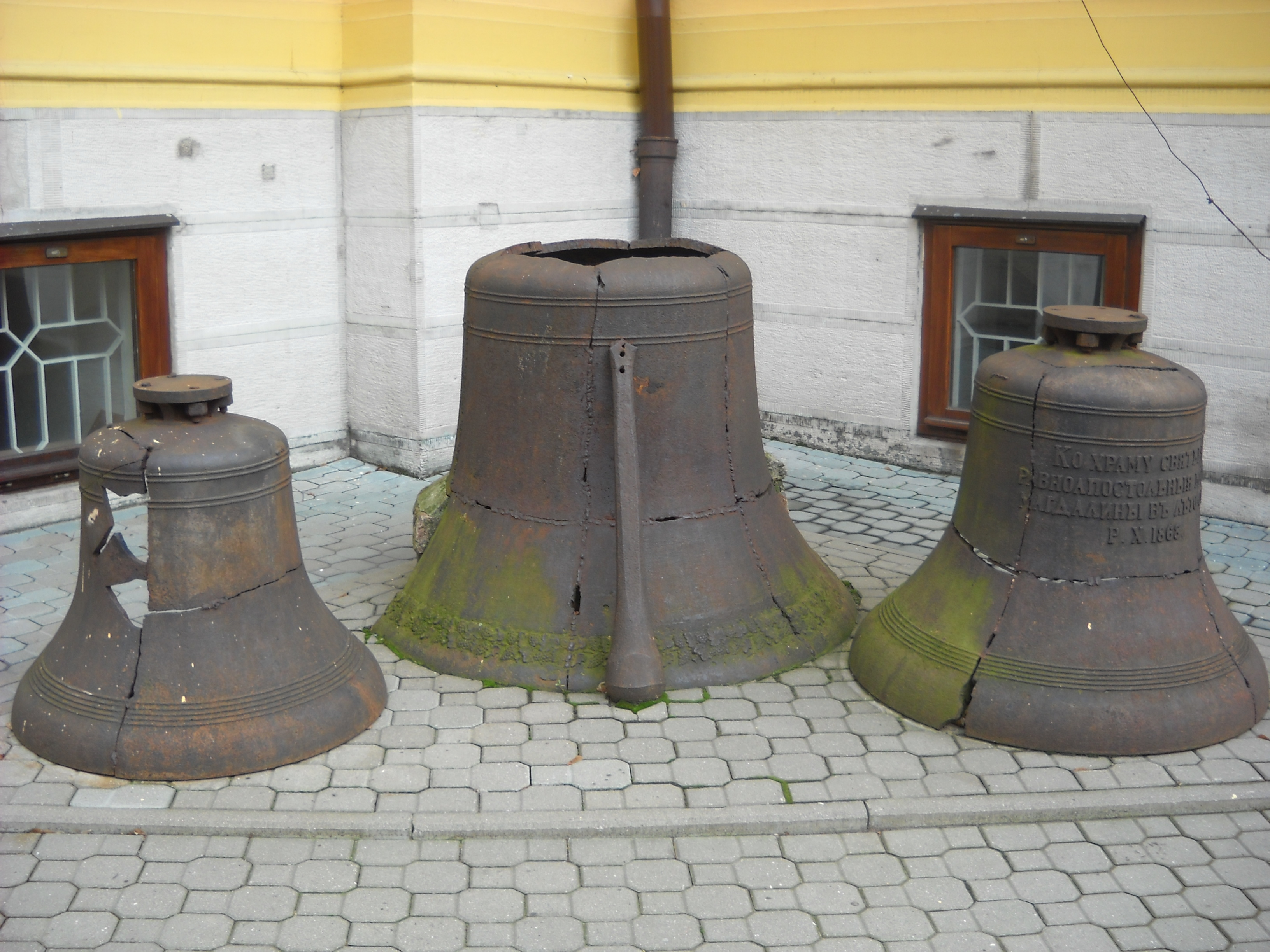 Dzwony soboru św. Marii Magdaleny w Warszawie zniszczone przez hitlerowców w 1944